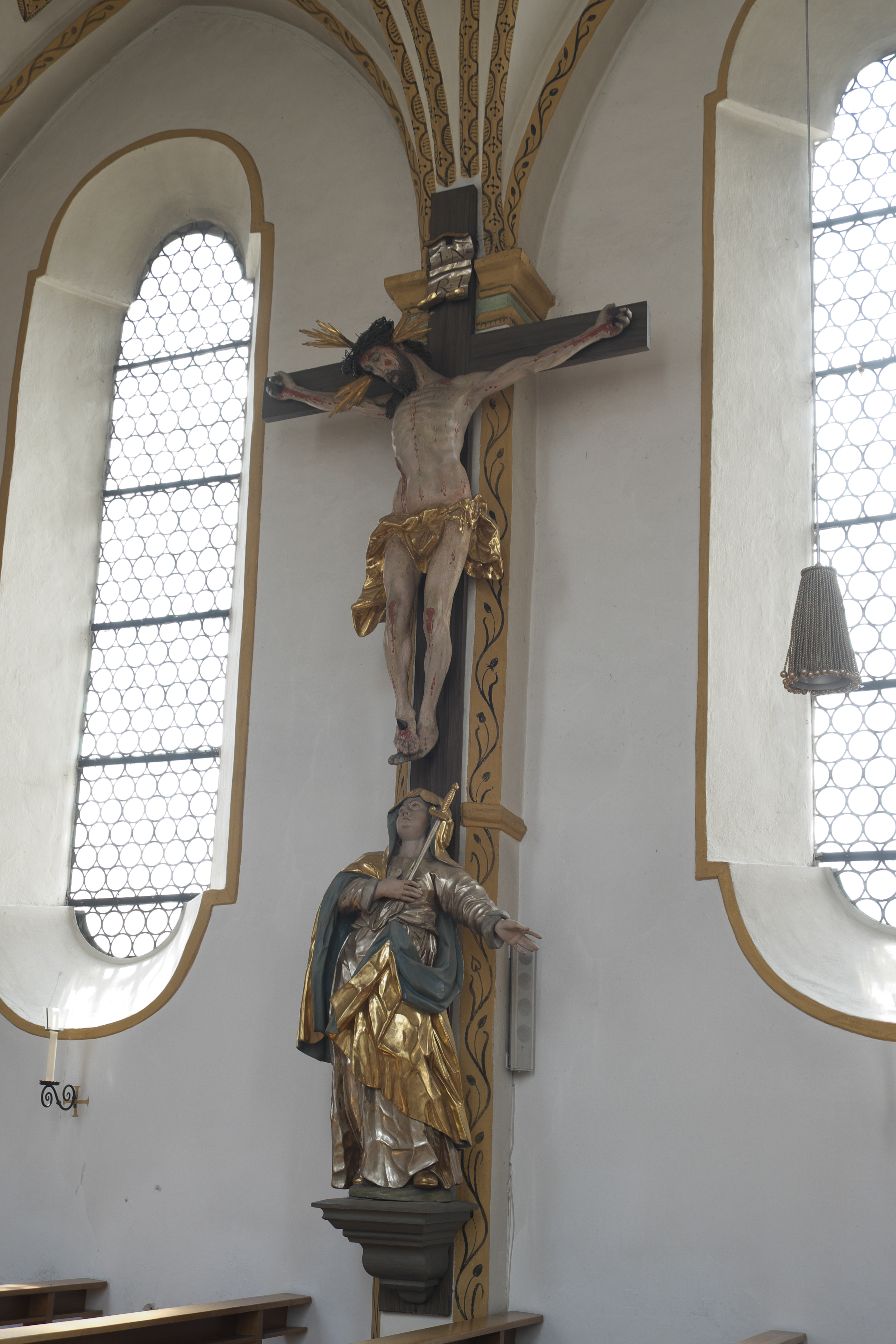 Katholische Pfarrkirche St. Andreas in Aying im Landkreis München (Bayern/Deutschland), Kruzifix mit Mater dolorosa